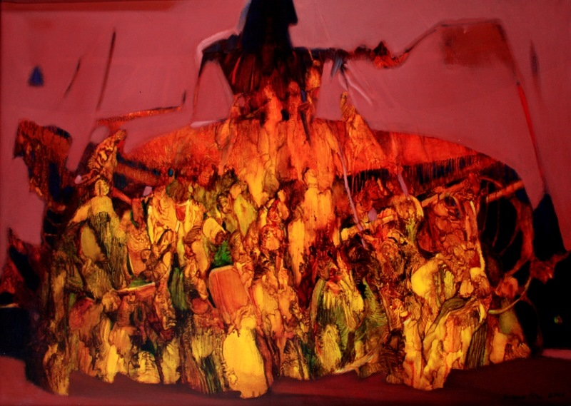 Grzegorz Stec, "Zarin", Oel auf Leinwand, 100x140cm